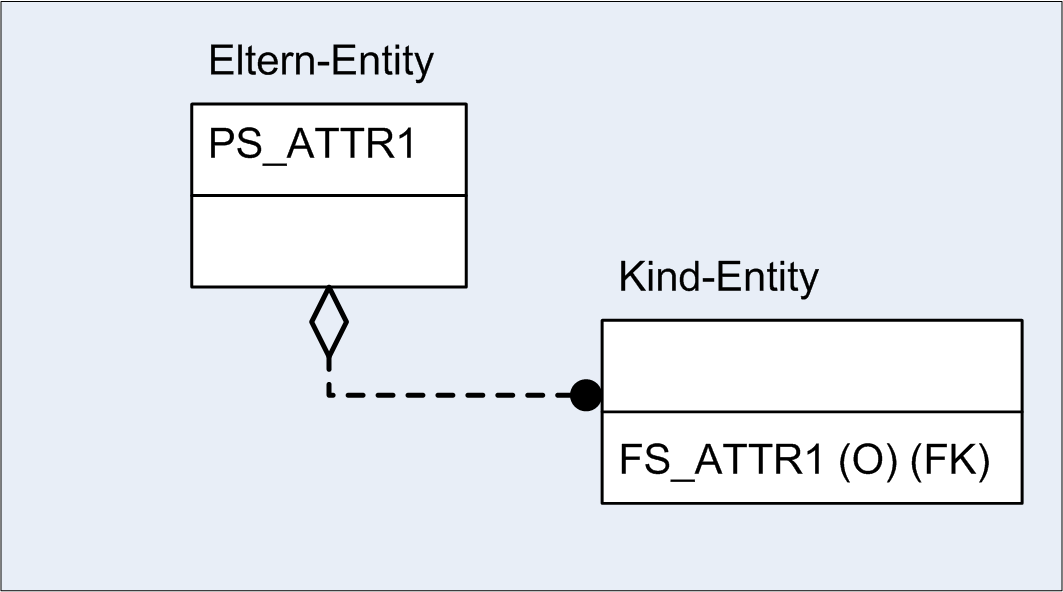 Beziehungsdarstellung in IDEF1X